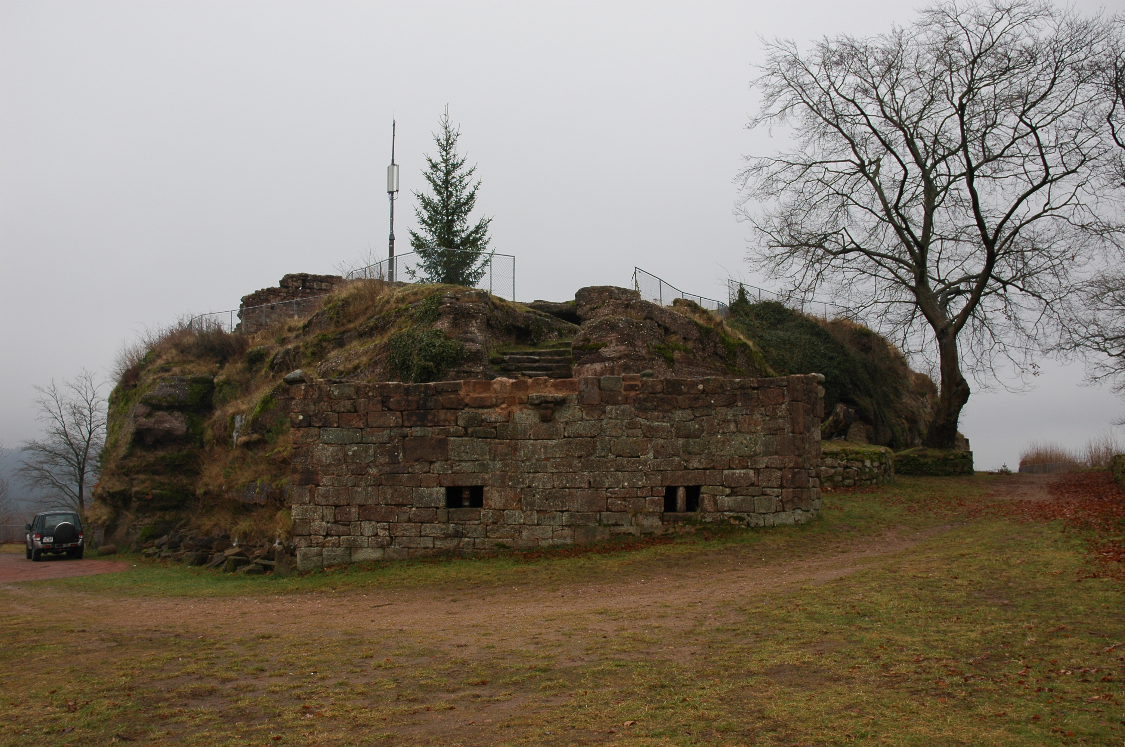 Castle Lemberg